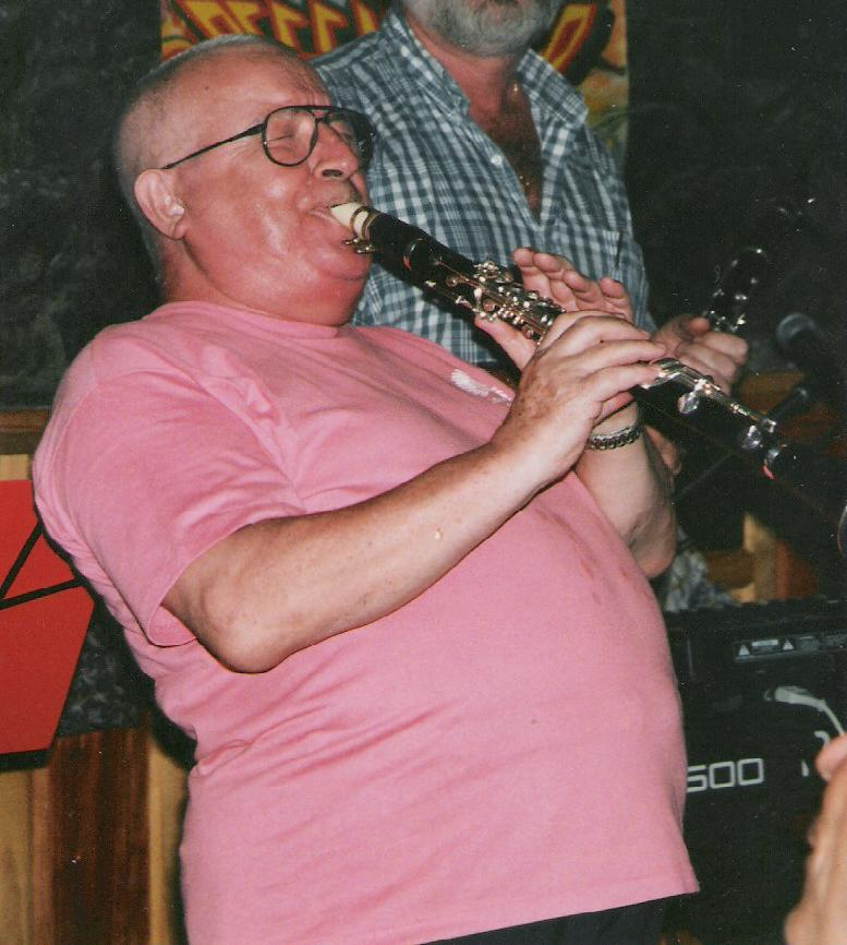 Le clarinettiste de jazz français Maxim Saury, en concert le 30 novembre 1996 au club « Le D. Day », au Tampon (La Réunion)